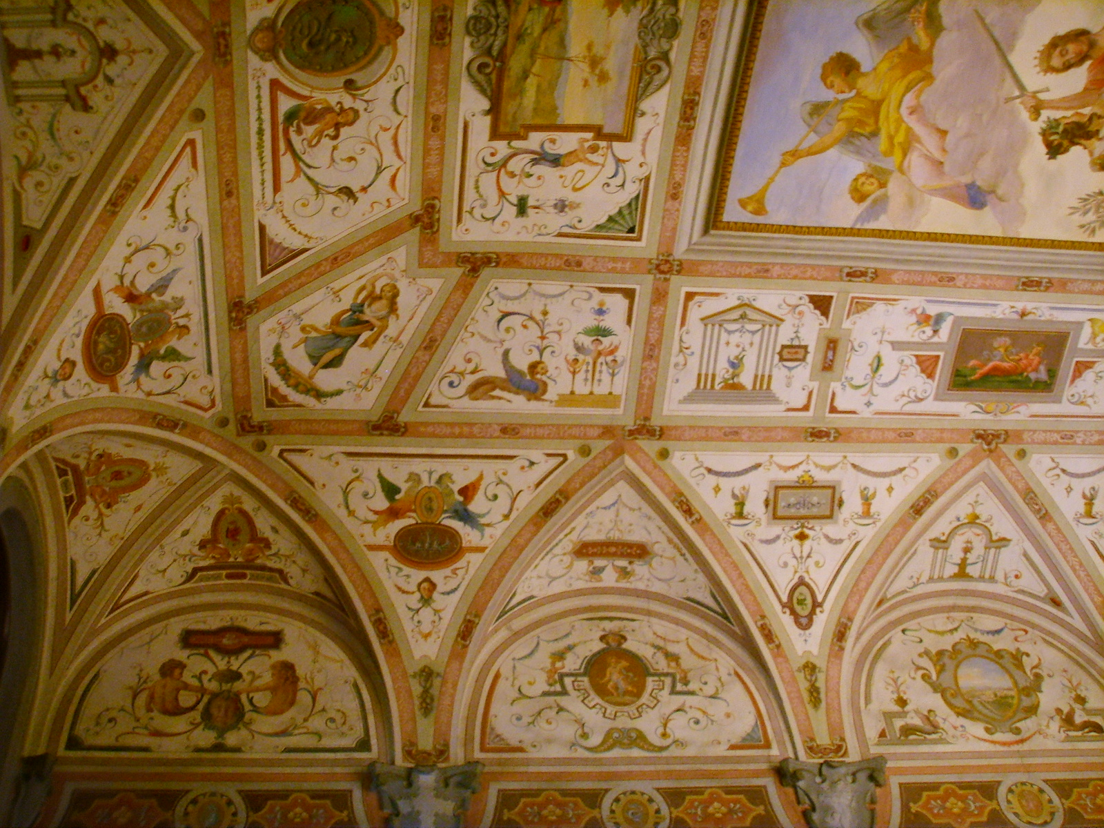 Palazzo_di_San_Clemente,_ affreschi_salone_ingresso in Florence